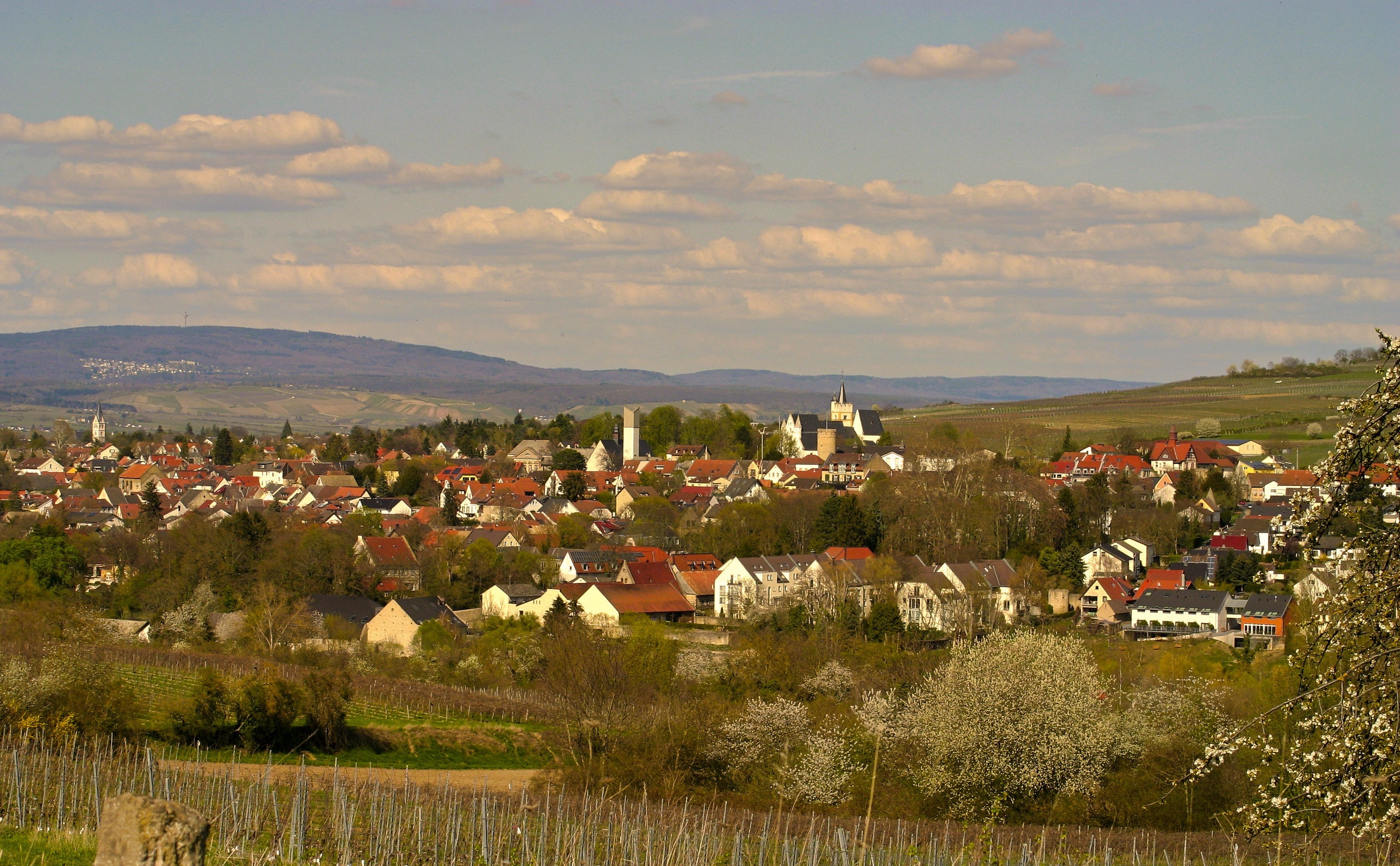 Nieder-Ingelheim im April 2019 vom Westerberg aus gesehen.